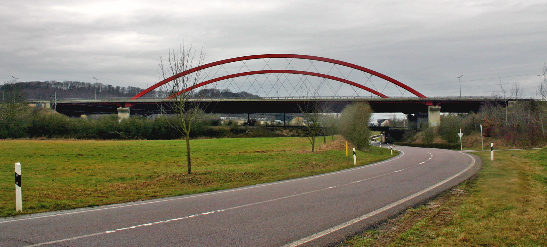 Schëfflenger Bréck.